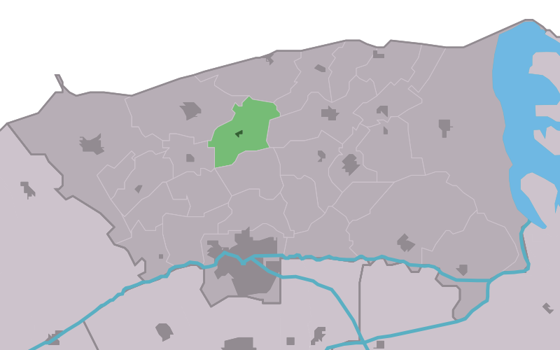 Kaartsje fan himrik fan Hantumhuzen